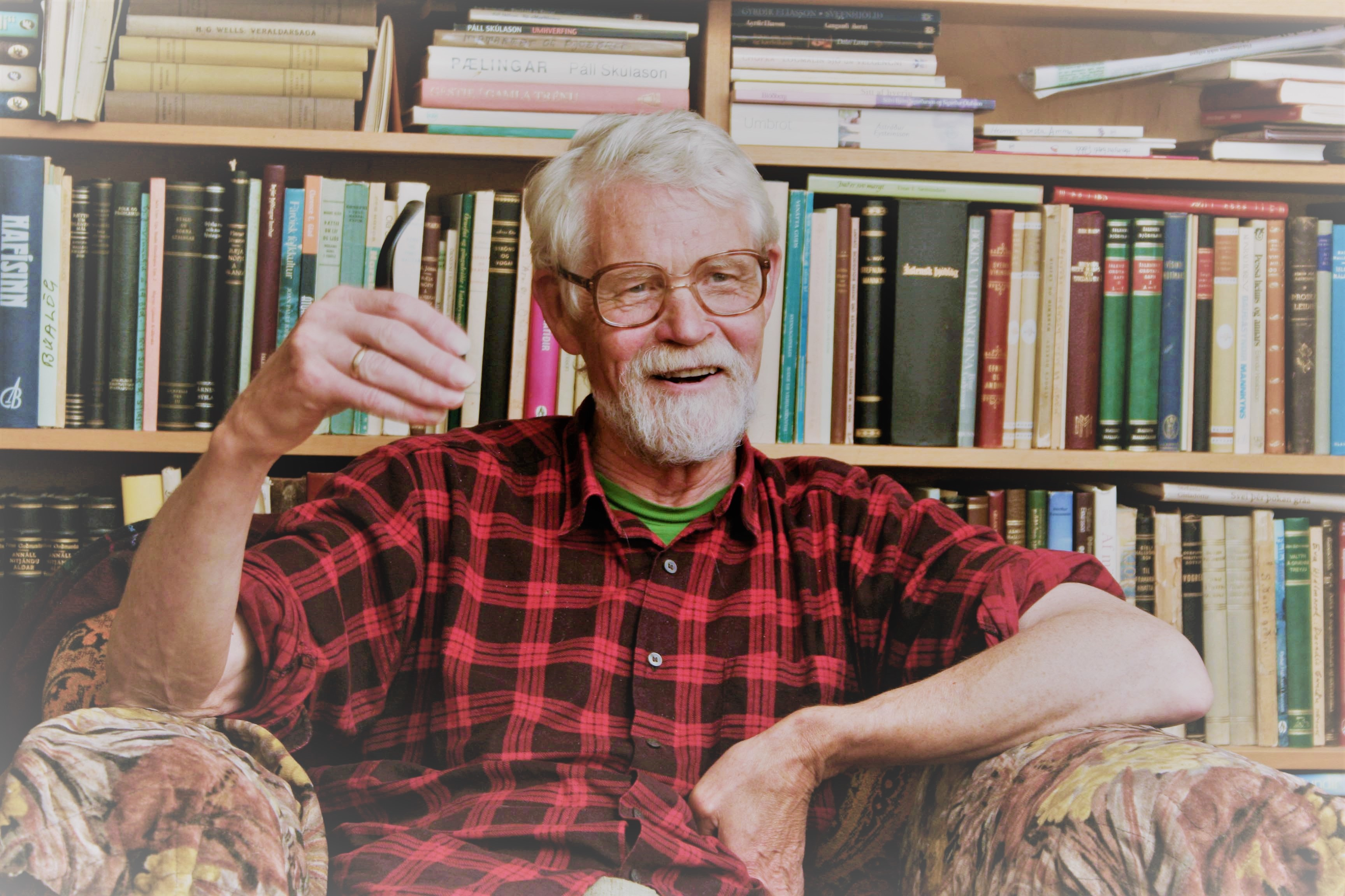 Helgi Hallgrimsson